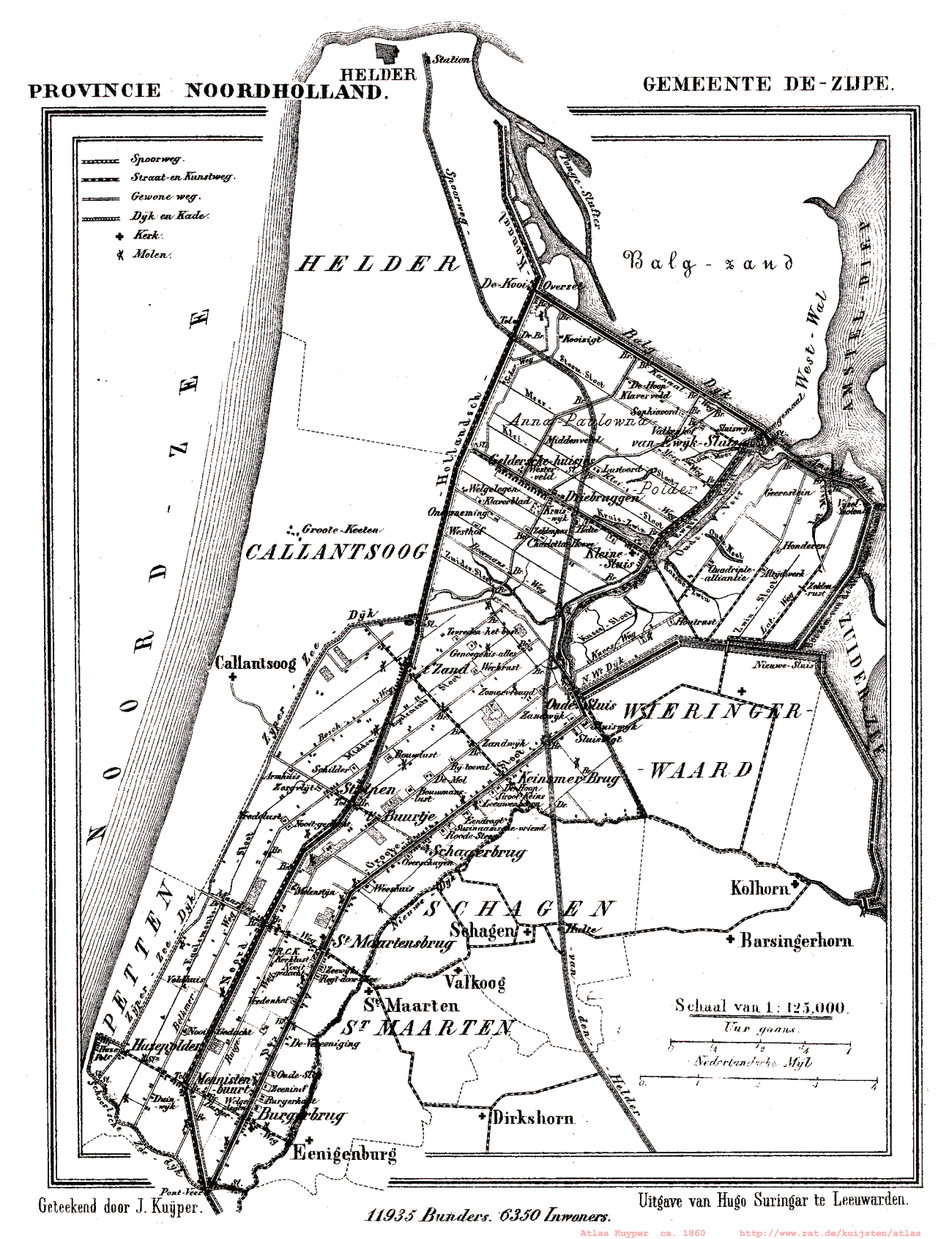 Kaart van de voormalige gemeente Zijpe uit Gemeente Atlas van Nederland, J. Kuyper 1865-1870, Uitgave Hugo Suringar Leeuwarden.